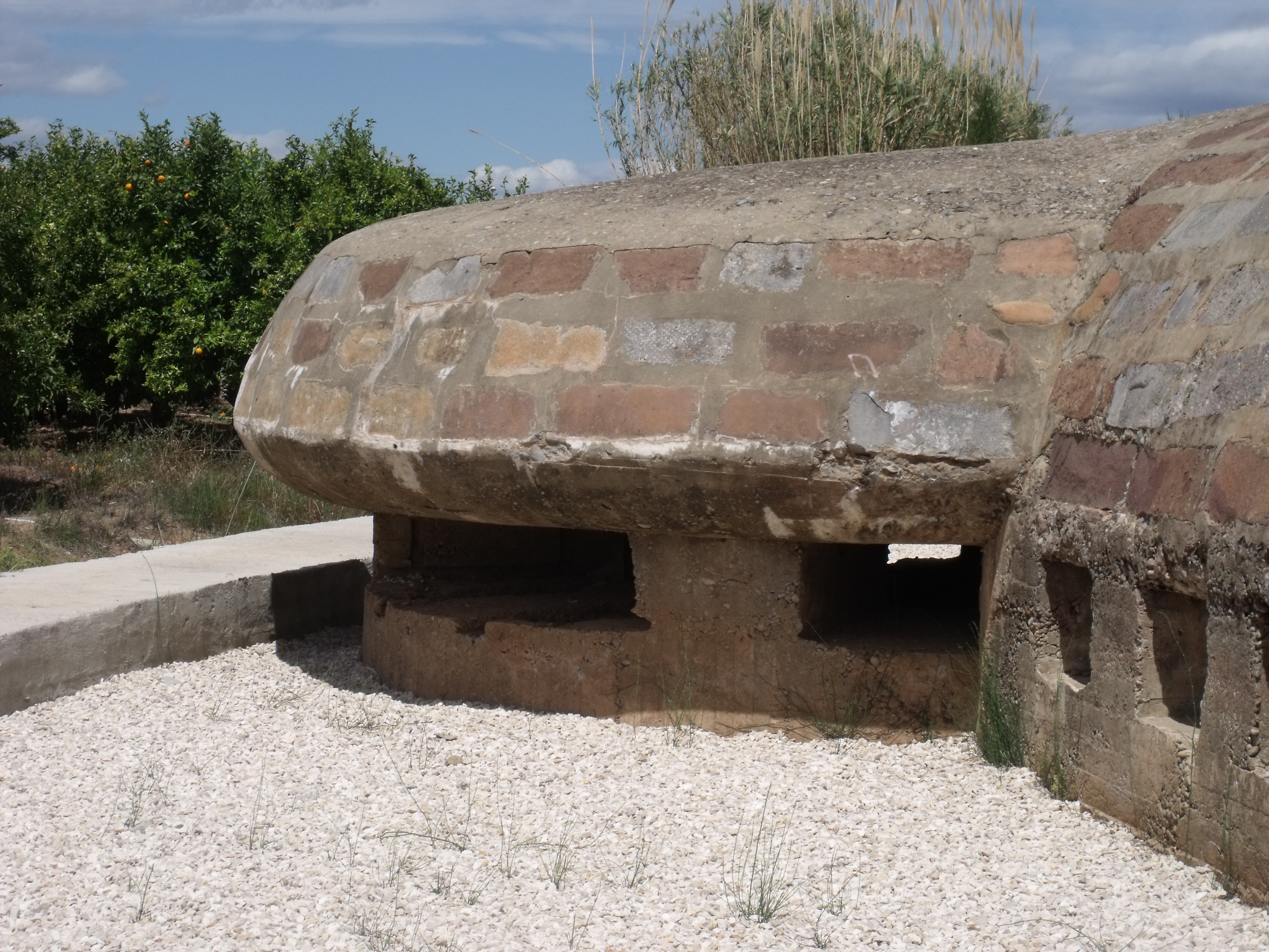 Vista general de la posición de la ametralladora